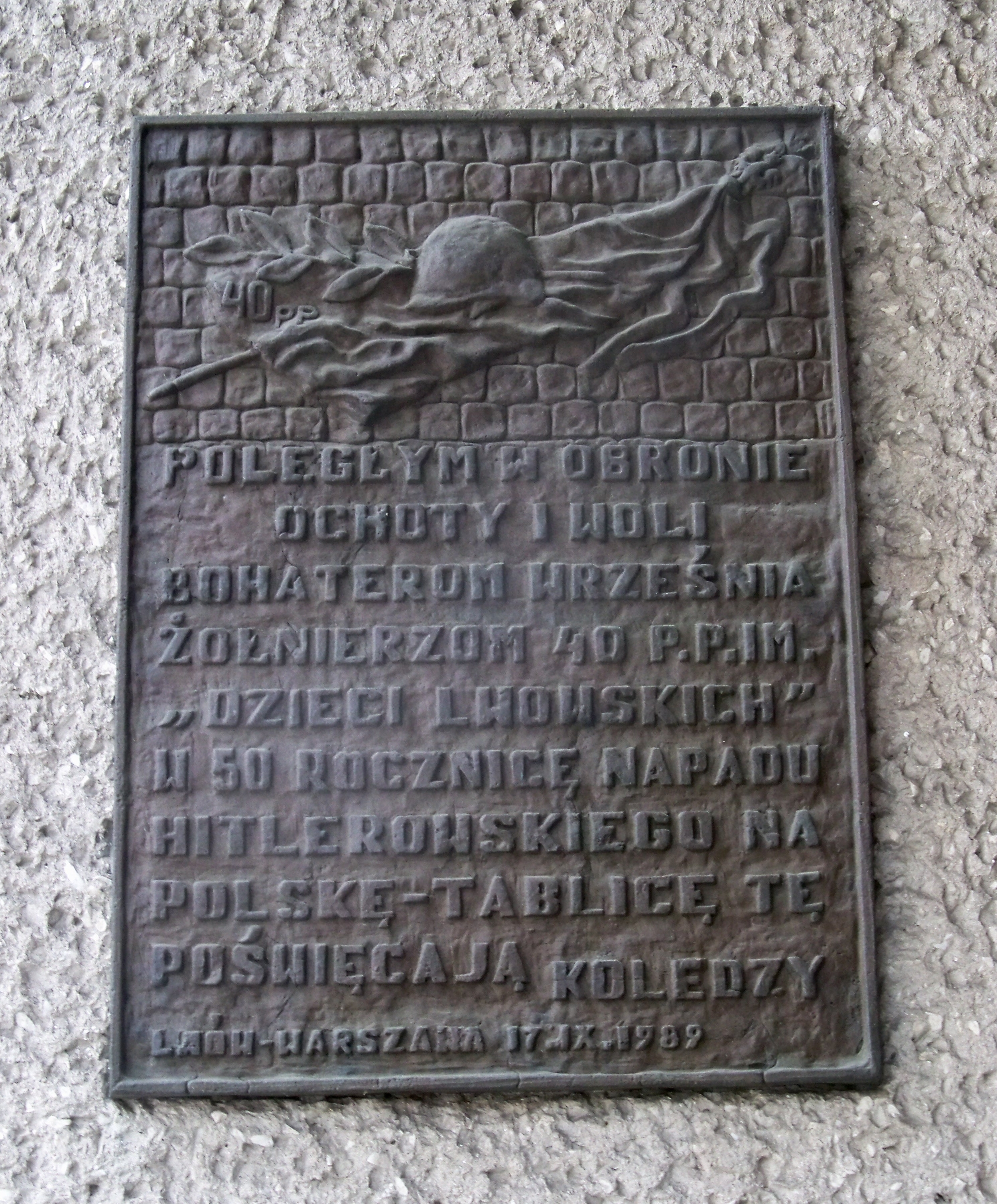 Tablica ku pamięci 40 Pułku Piechoty Dzieci Lwowskich na ścianie Kościoła pw. NMP Królowej Świata na Ochocie.